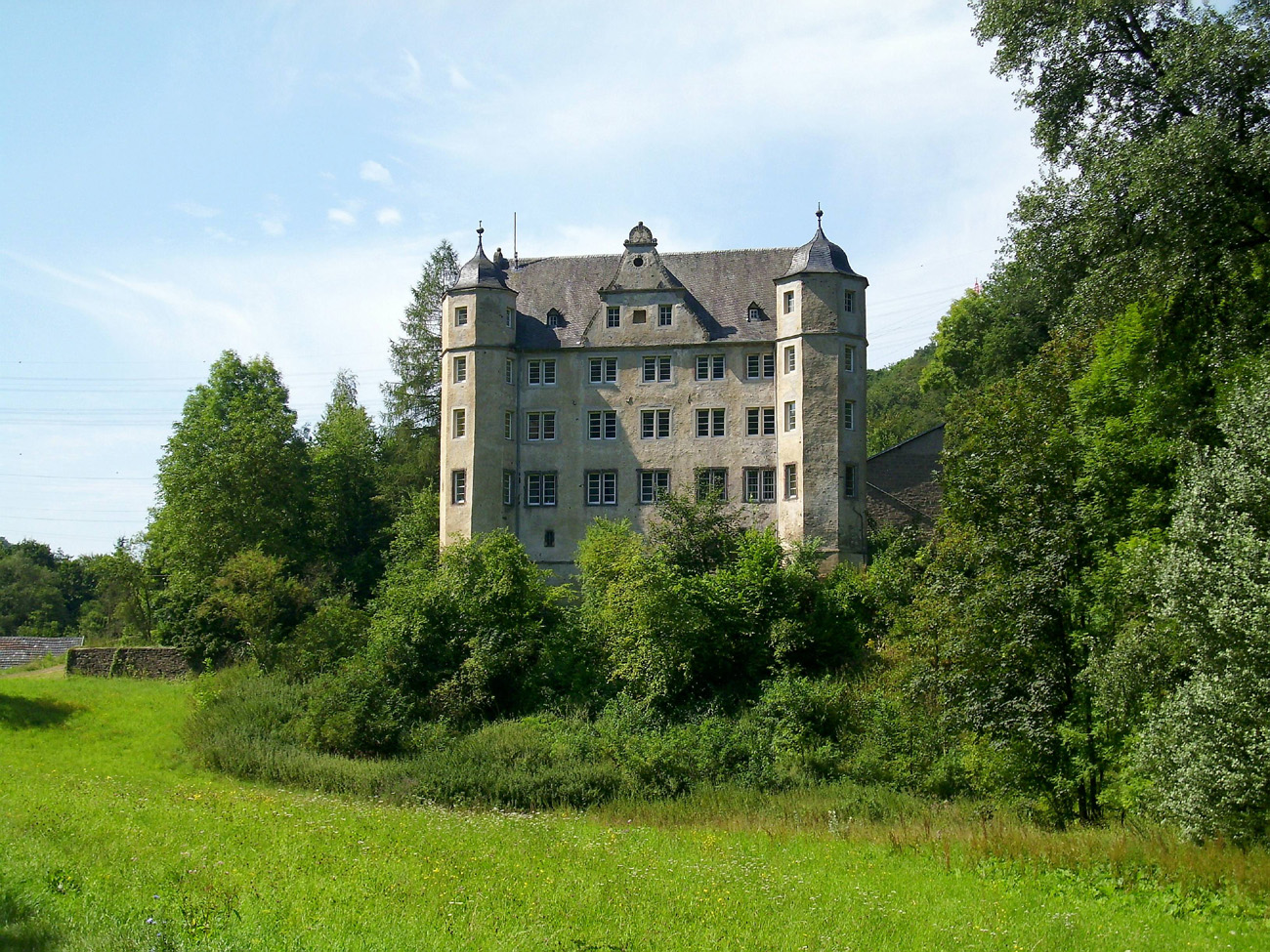 Hauptfassade der Schweppenburg